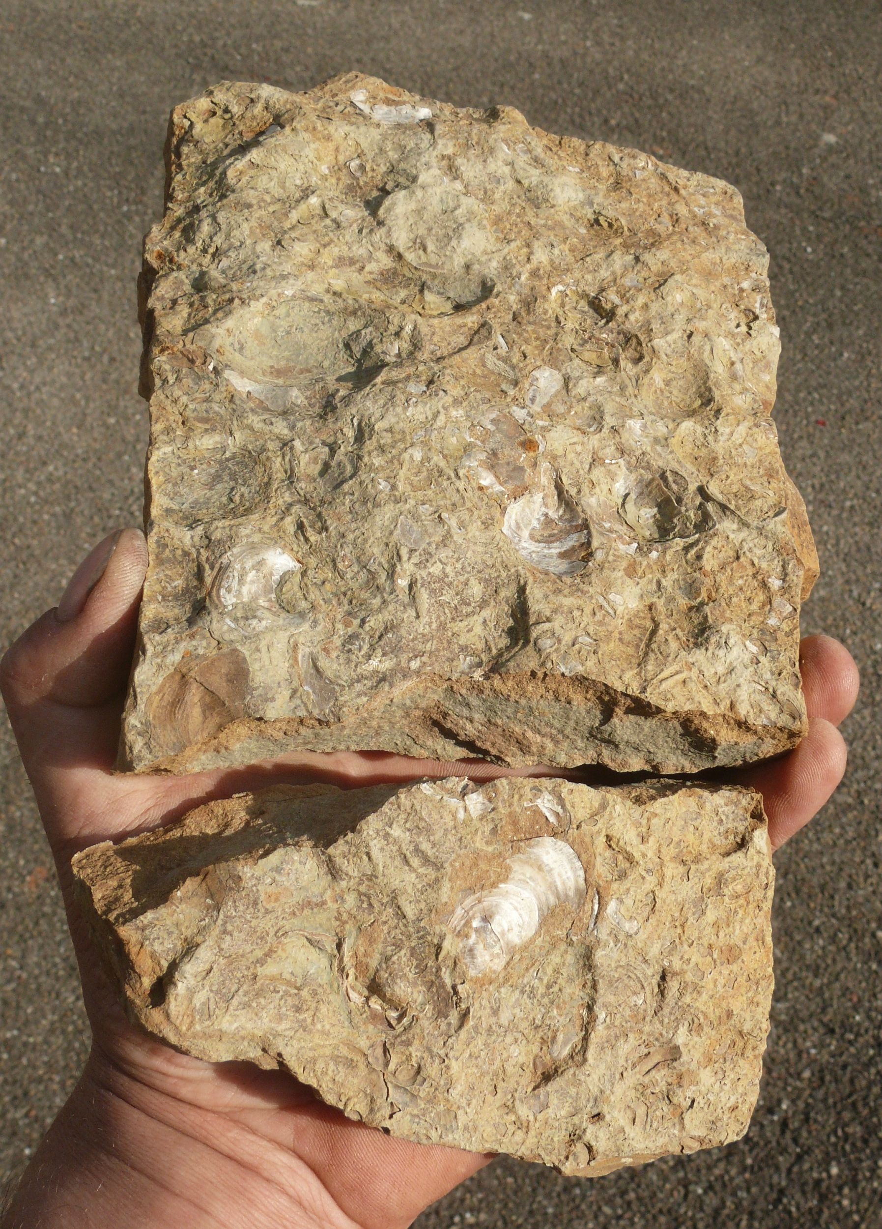 Kalkbänkchen im Psilonotenton mit Schill Albvorland, Deutschland